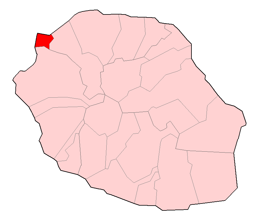 Carte de la Réunion permettant de localiser Le Port.